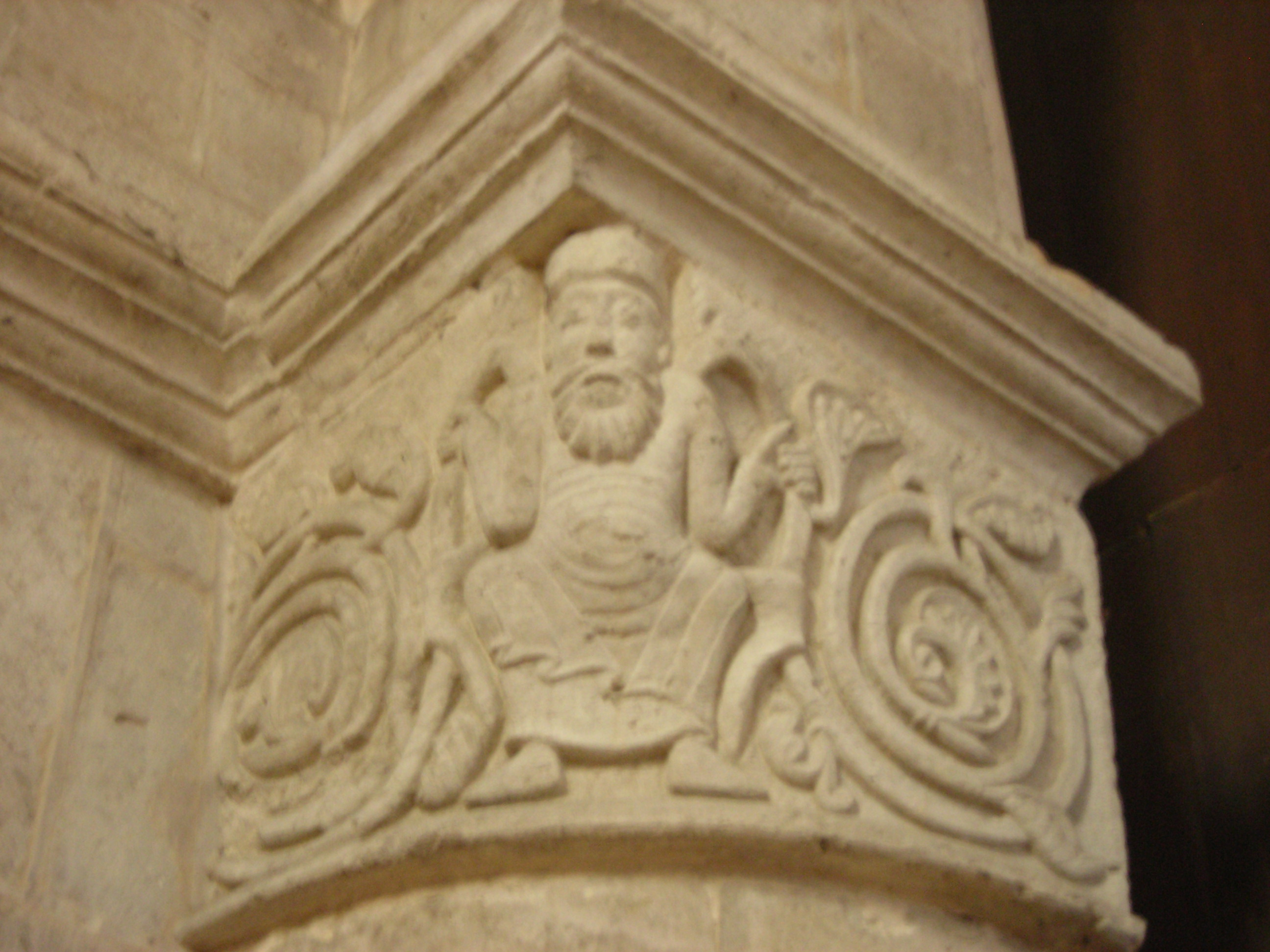 Étampes